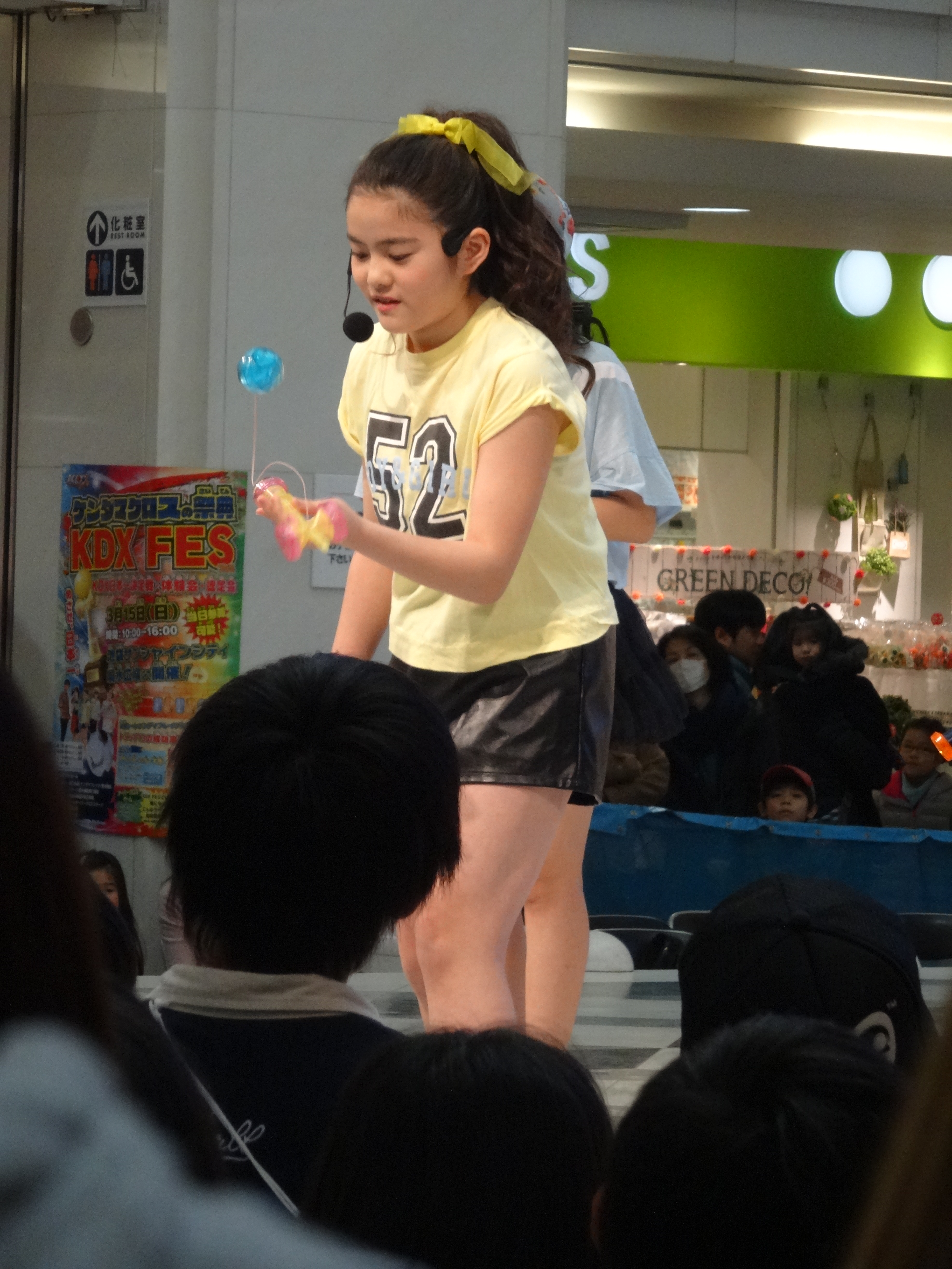 井東紗椰(おはガールふわわ)。2015年3月15日にサンシャインシティで行われた『KDX FES 日本一決定戦』にて。